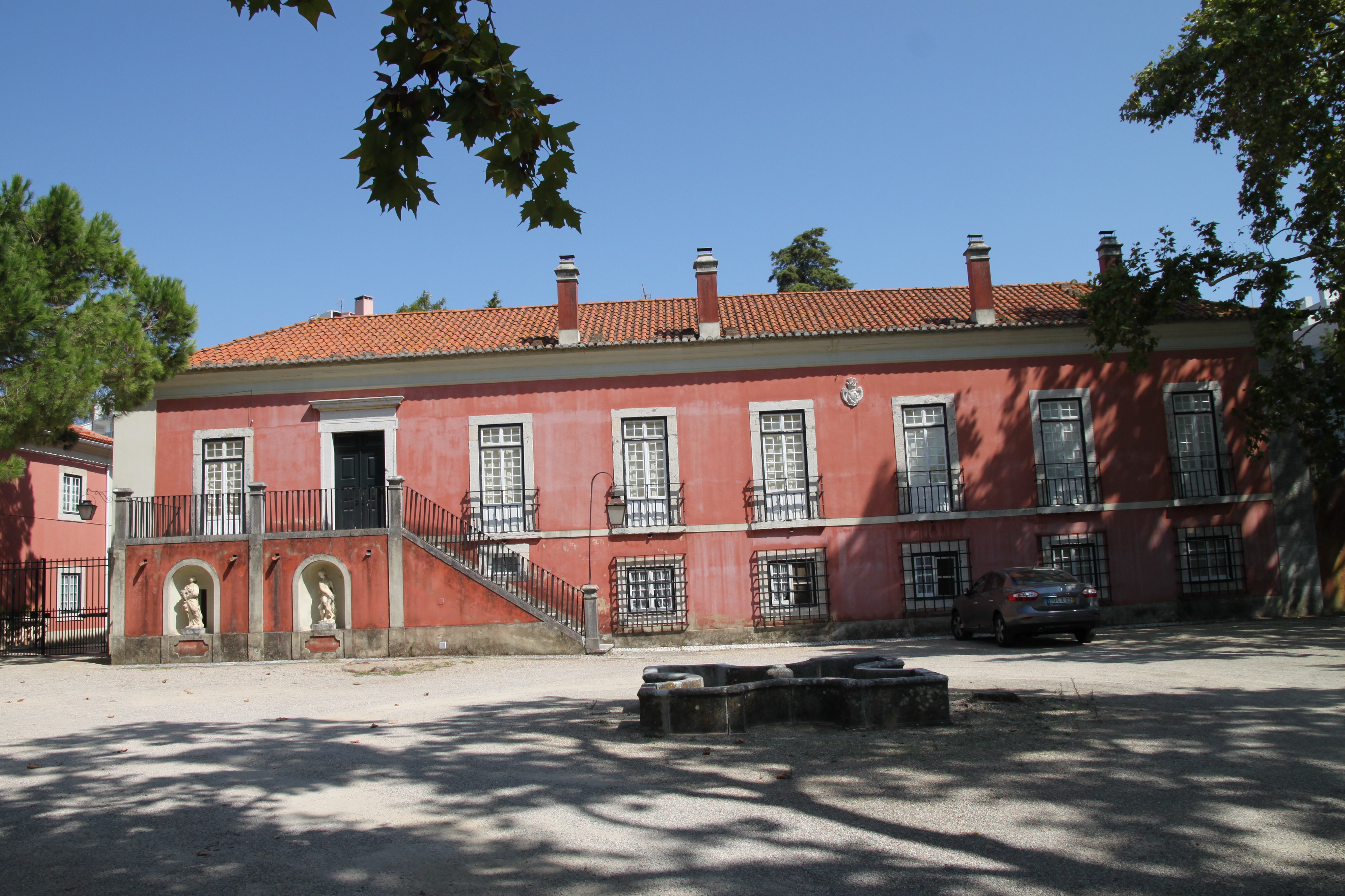 Quinta dos Lagares d'El-Rei This file was uploaded for Wiki Loves Monuments in Portugal with the unique identifier 75032.